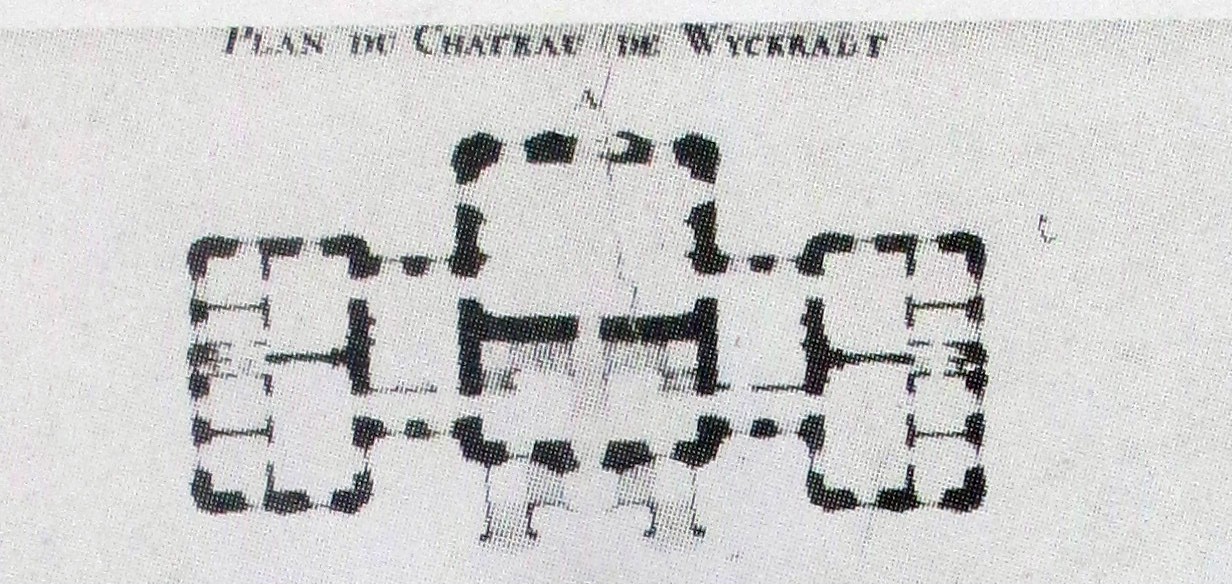 Grundriss des Chateau de Wyckradt (Schloss Wickrath); von Informationstafel abfotografiert